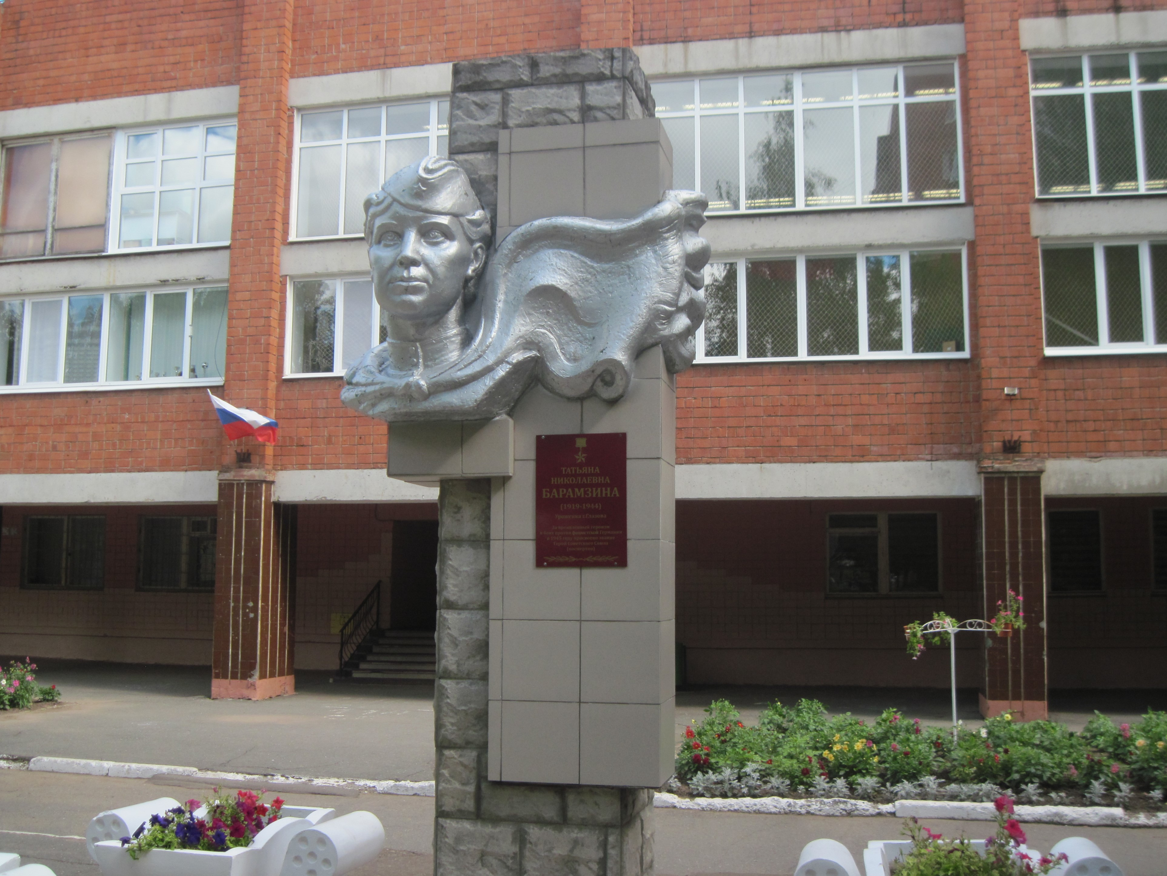 Территория школы № 53 города Ижевска.